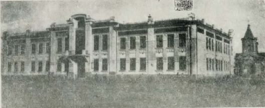 фото женской гимназии (на переднем плане), и армянской церкви на заднем